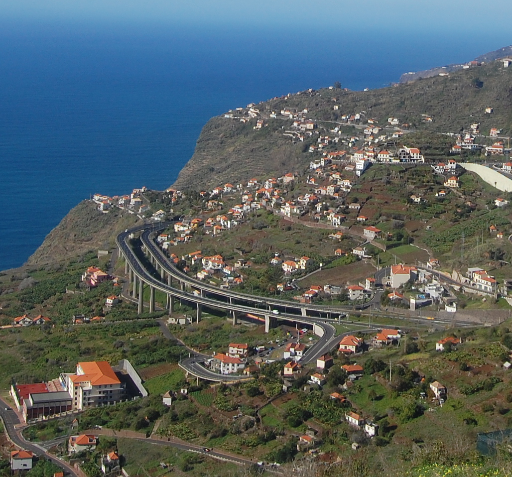 VR1 na Ilha da Madeira - Passagem em viaduto na zona do Campanário.